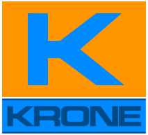 Logo Krone Supermarkt 1995